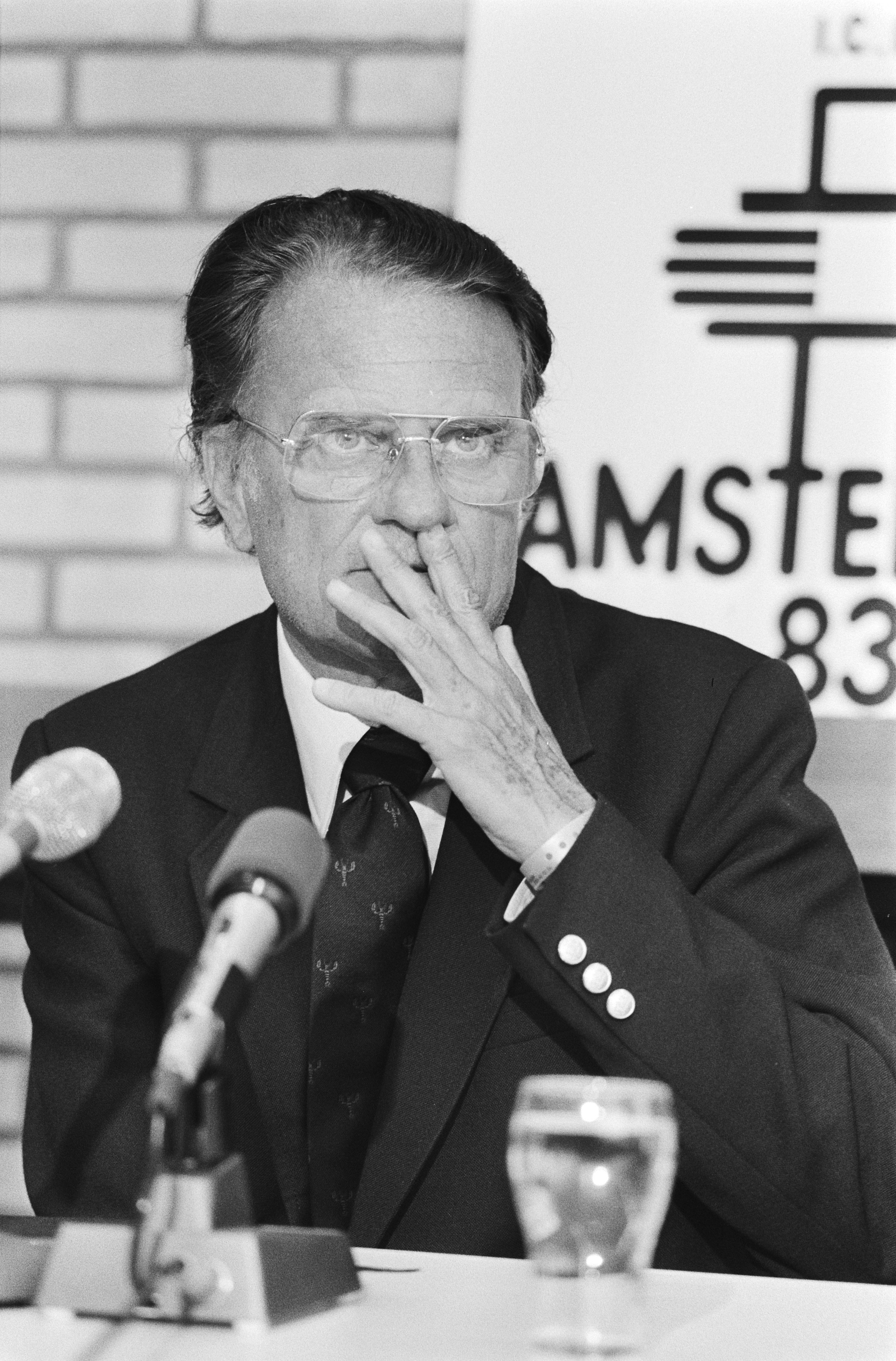 Collectie / Archief : Fotocollectie Anefo Reportage / Serie : Internationale Conferentie voor reizende evangelisten in de RAI in Amsterdam Beschrijving : Amerikaanse evangelist Billy Graham tijdens een persconferentie Datum : 11 juli 1983 Locatie : Amsterdam, Noord-Holland Trefwoorden : conferenties, evangelisatie, persconferenties, portretten Persoonsnaam : Graham, Billy Fotograaf : Antonisse, Marcel / Anefo Auteursrechthebbende : Nationaal Archief Materiaalsoort : Negatief (zwart/wit) Nummer archiefinventaris : bekijk toegang 2.24.01.05 Bestanddeelnummer : 932-6469